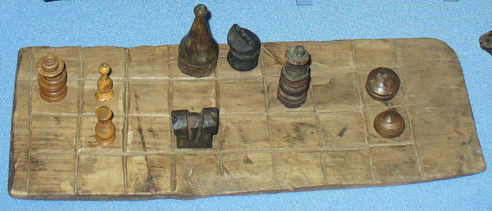 Фрагмент шахматной доски, шахматные фигуры и шашки, Россия (Мангазея), XVII век (1601-1672).